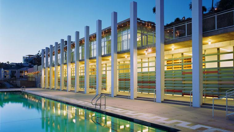 Annenberg Beach hosue